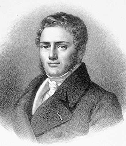 portrait de Saint-Amand Bazard (1791-1832), gravure